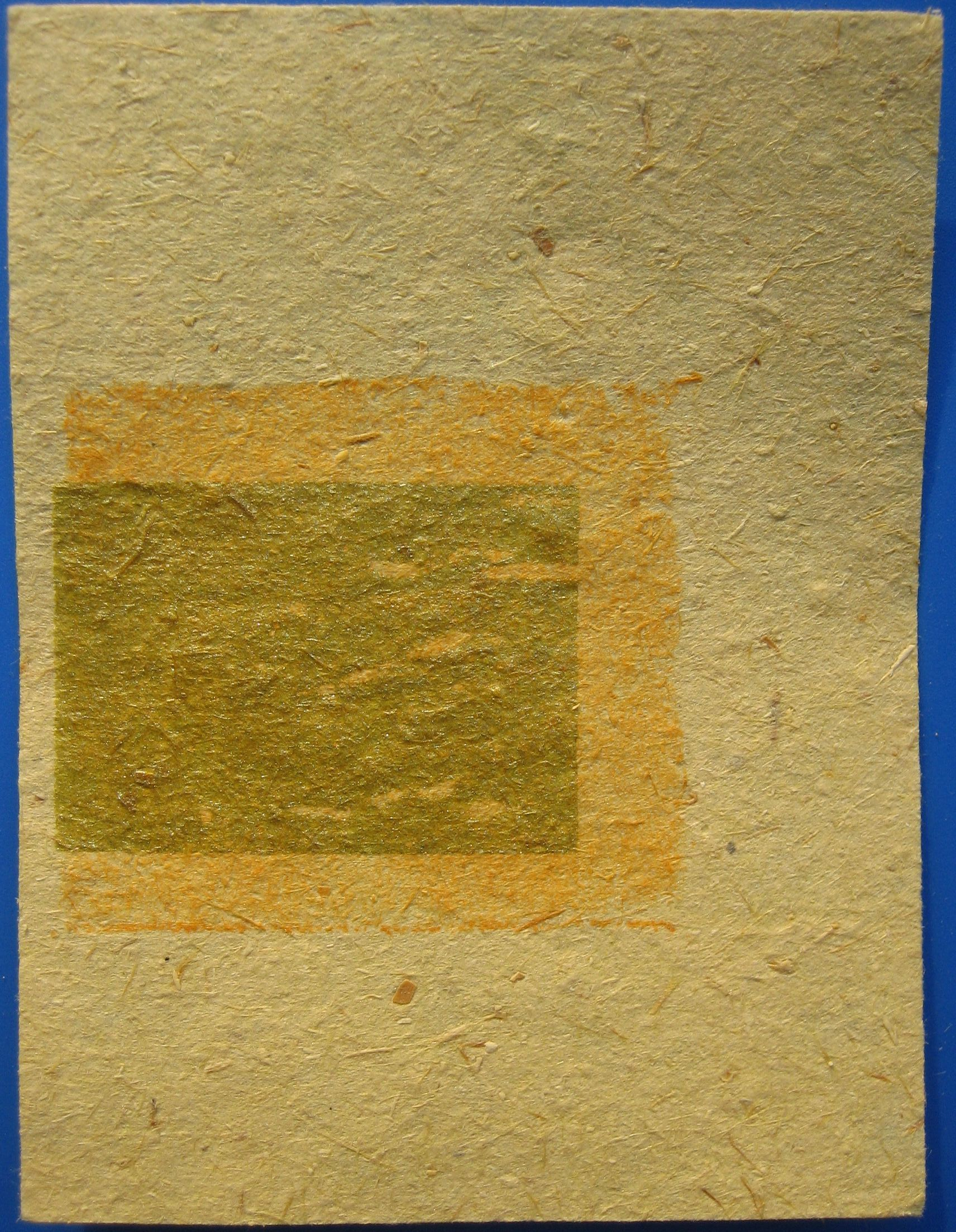 刈金，北臺灣民眾祭拜地基主所用的紙錢